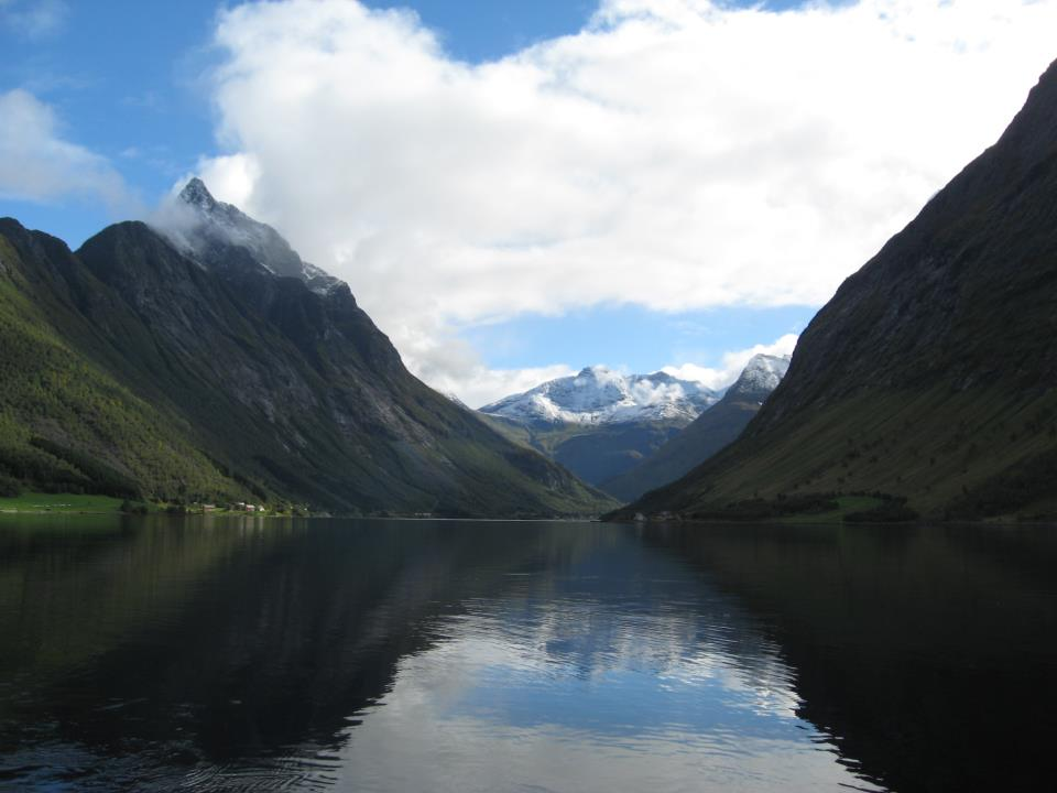 Utsikt frå Urke innover Nordangsfjorden og Slogen